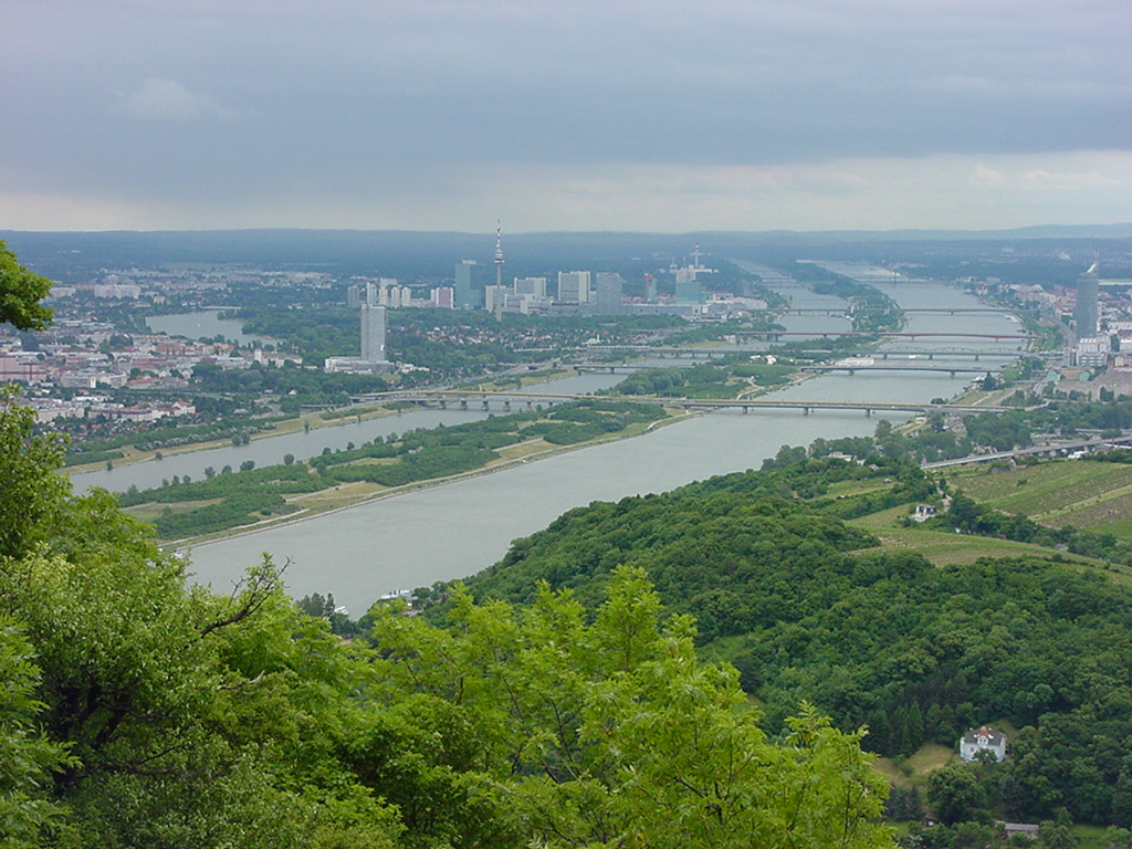 Donau